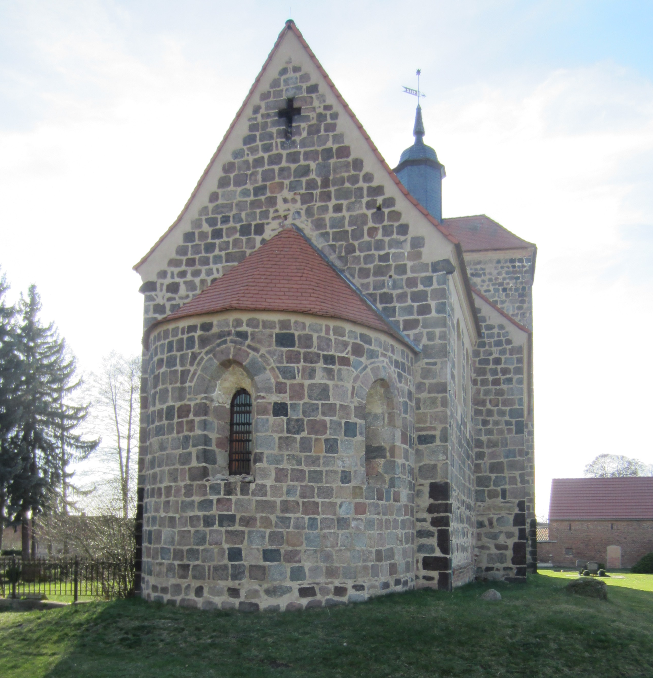 Waltersdorf, Gemeinde Heideblick, denkmalgeschützte Dorfkirche, Ansicht von Osten